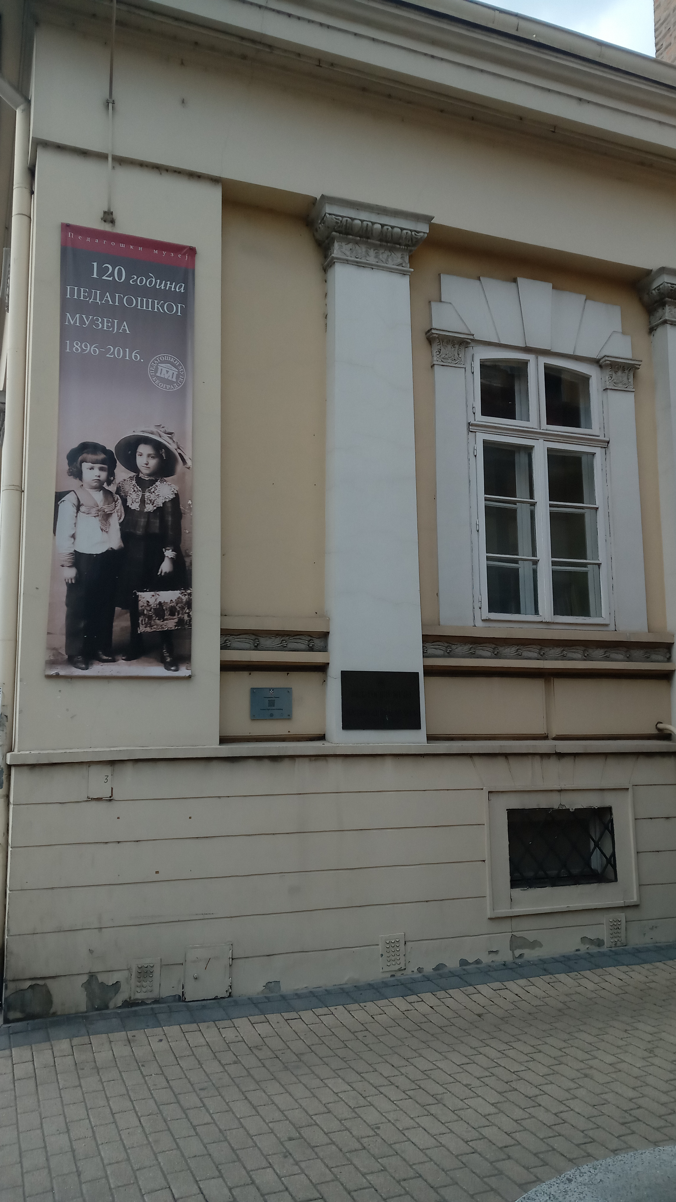 Srpski (latinica): Pedagoški muzej, Beograd, Srbija